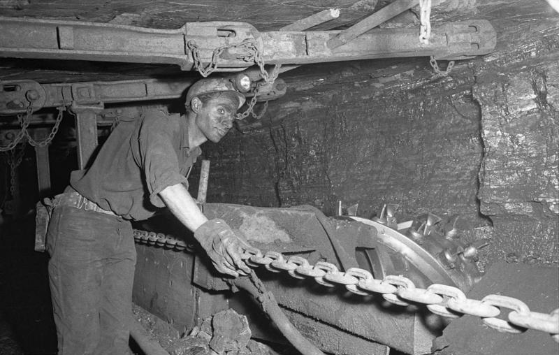 Italienische Gastarbeiter (Bergleute) in Walsum